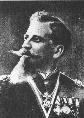 General Bernardo Reyes